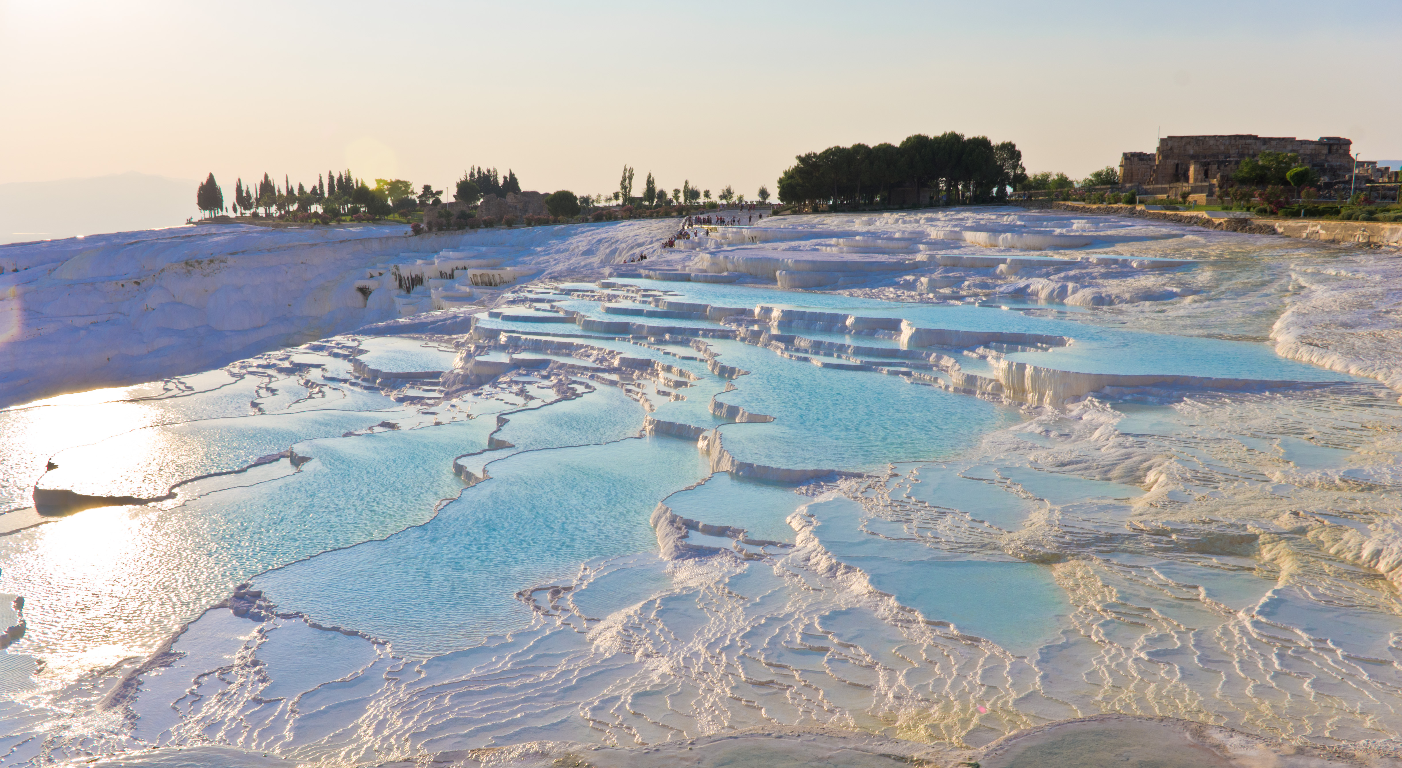 Pamukkale (Turquie)